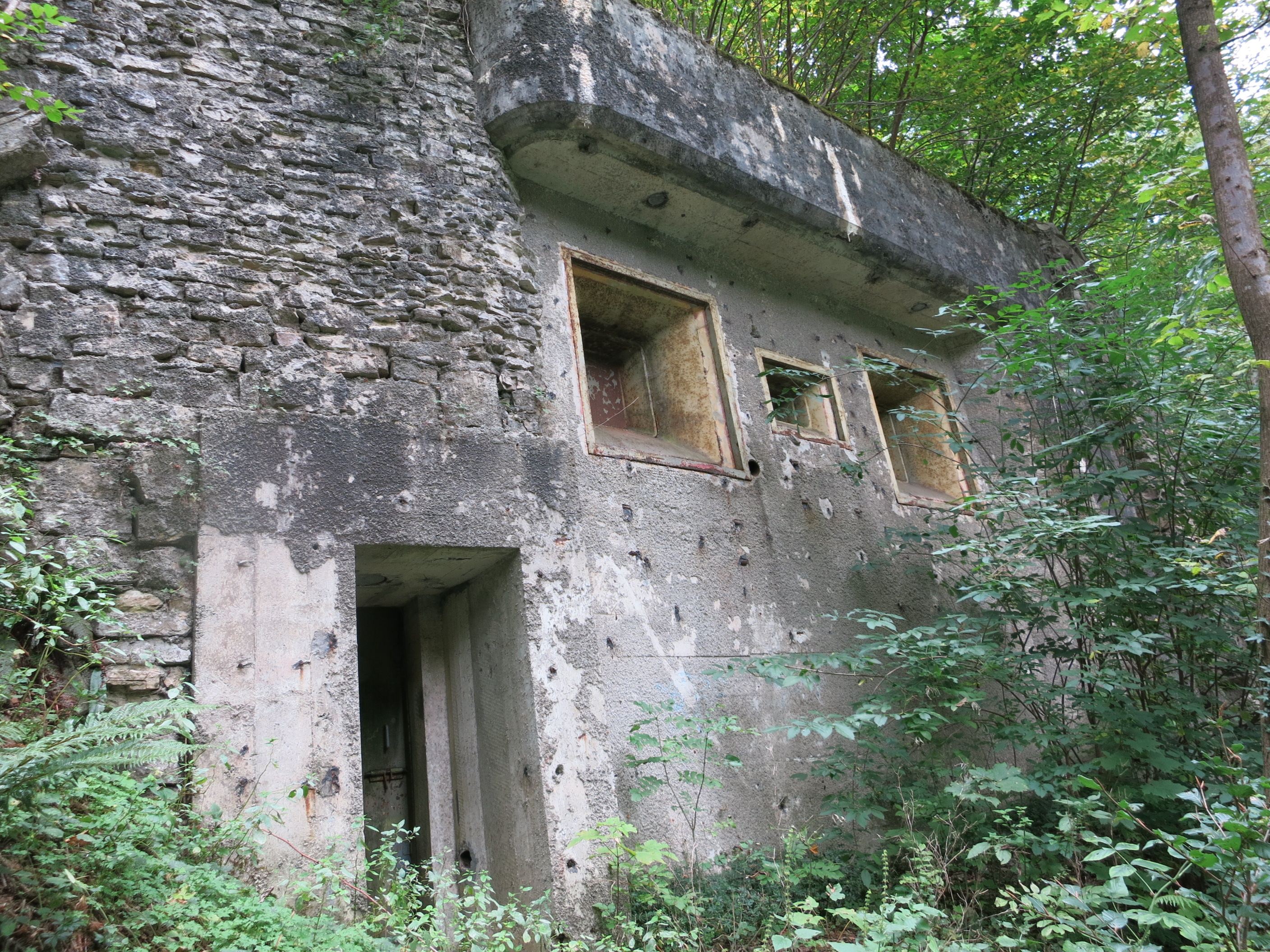 Infanteriewerk Pulfisei A 3554, Läufelfingen BL, Schweiz